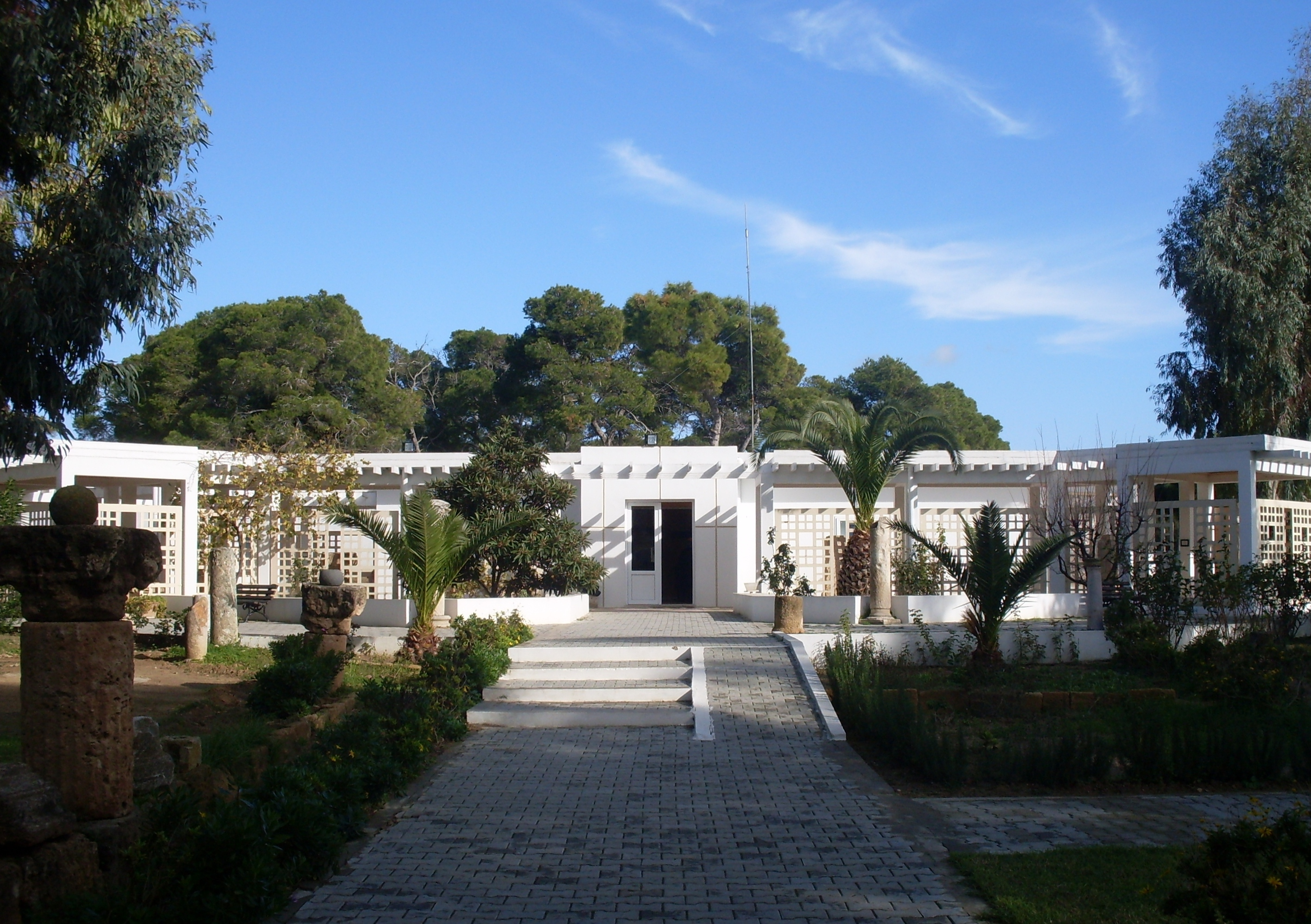 Tunisie, Musée du site archéologique d'Utique